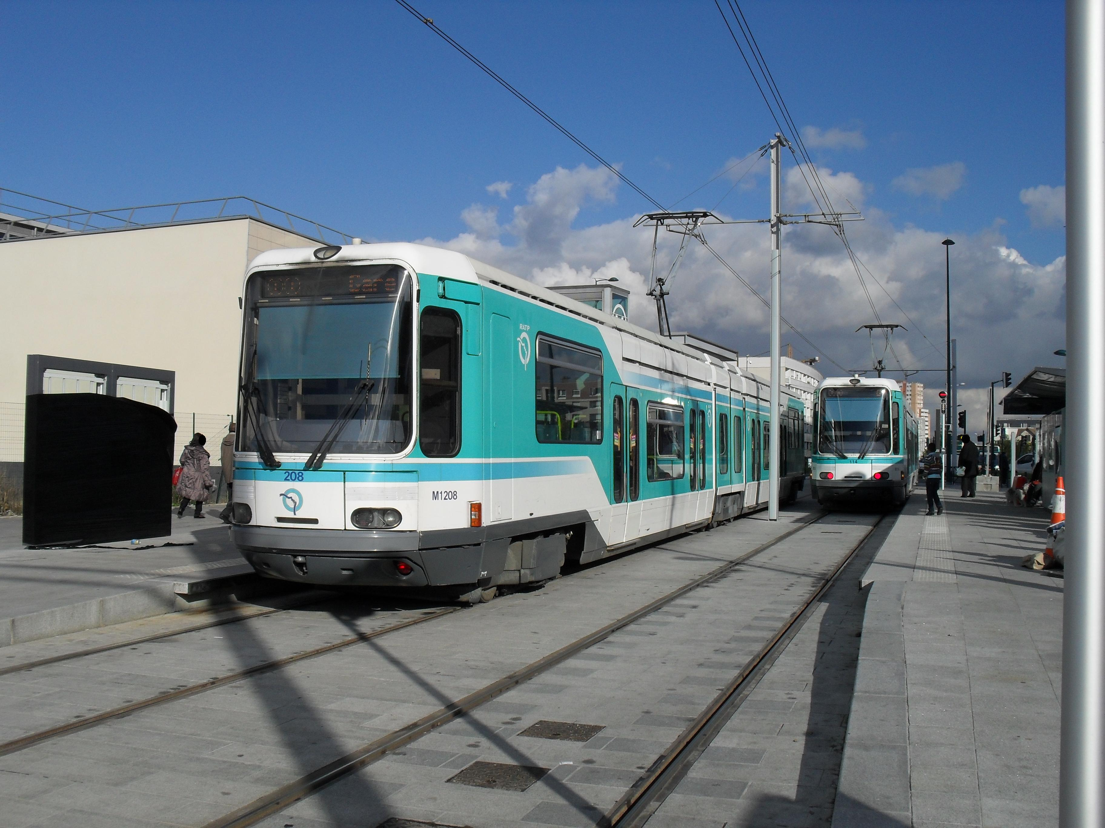 Paris Tramway ligne 1